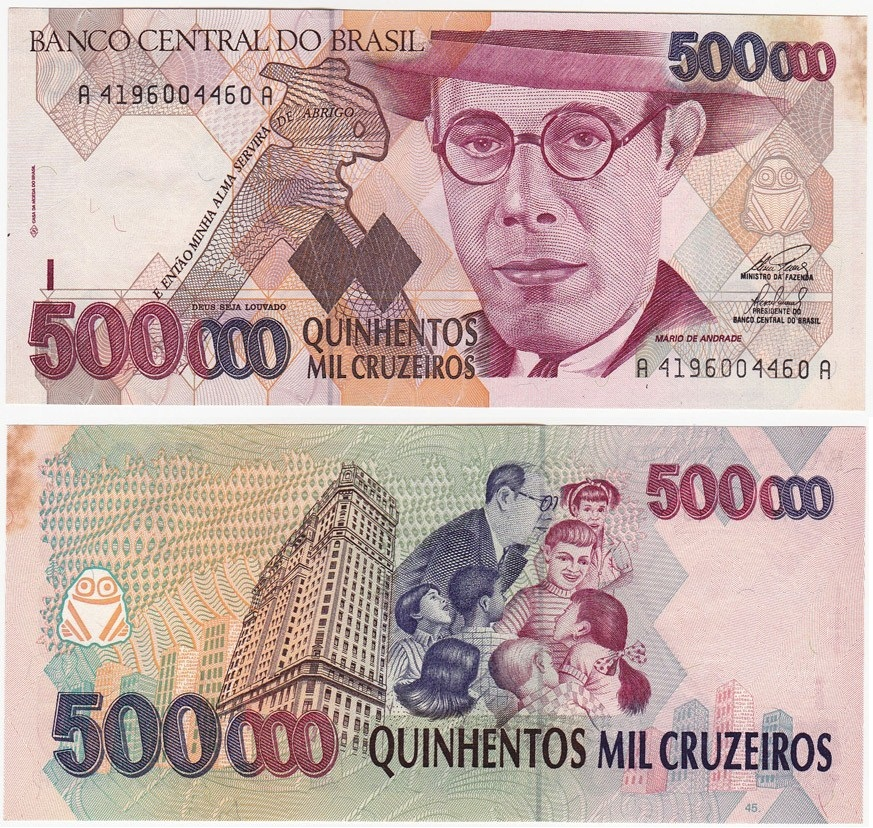 Cédula de 500000 cruzeiros com a efígie de Mário de Andrade.